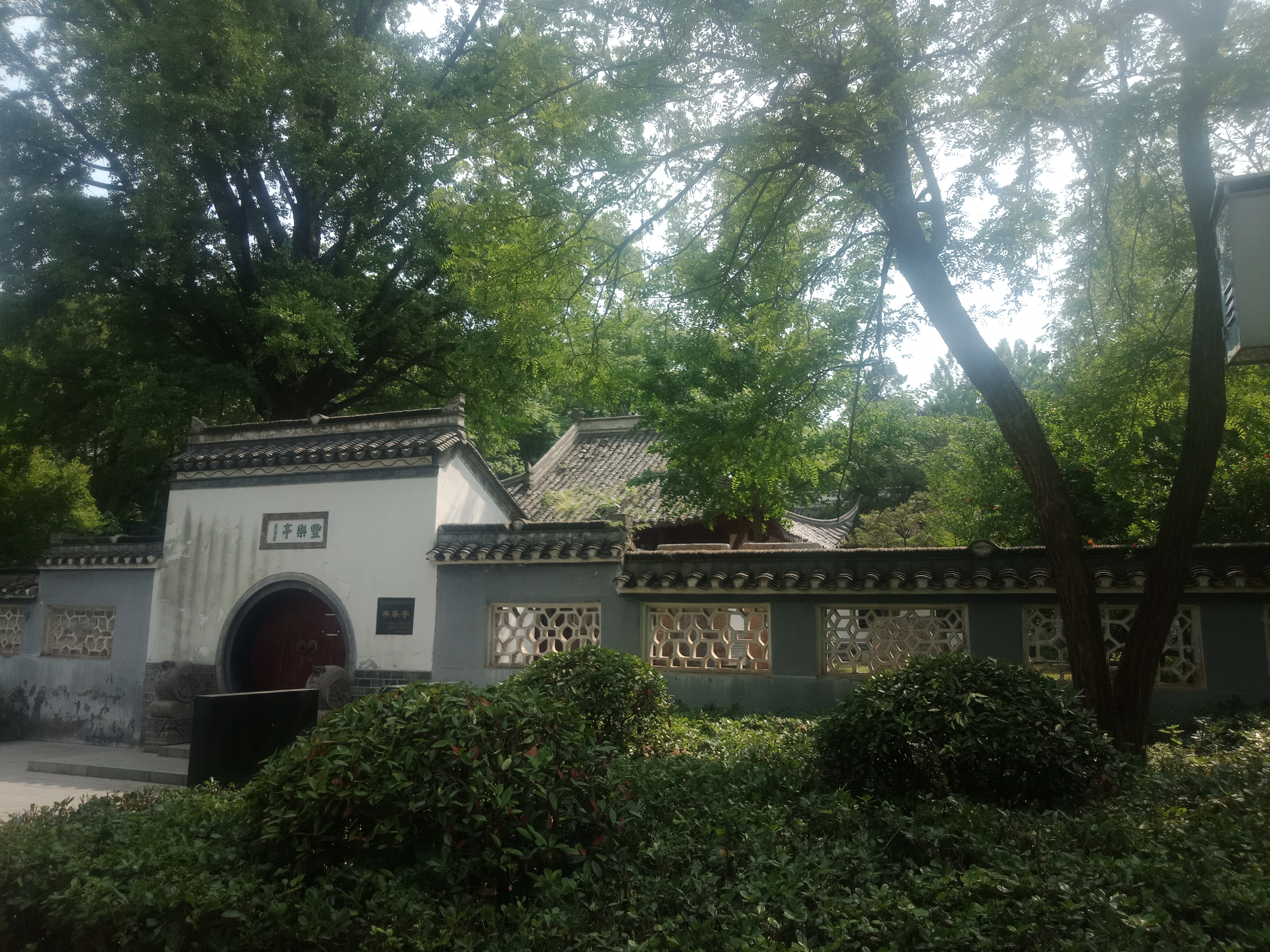 中文（中国大陆）: 我自己拍的丰乐亭图片1